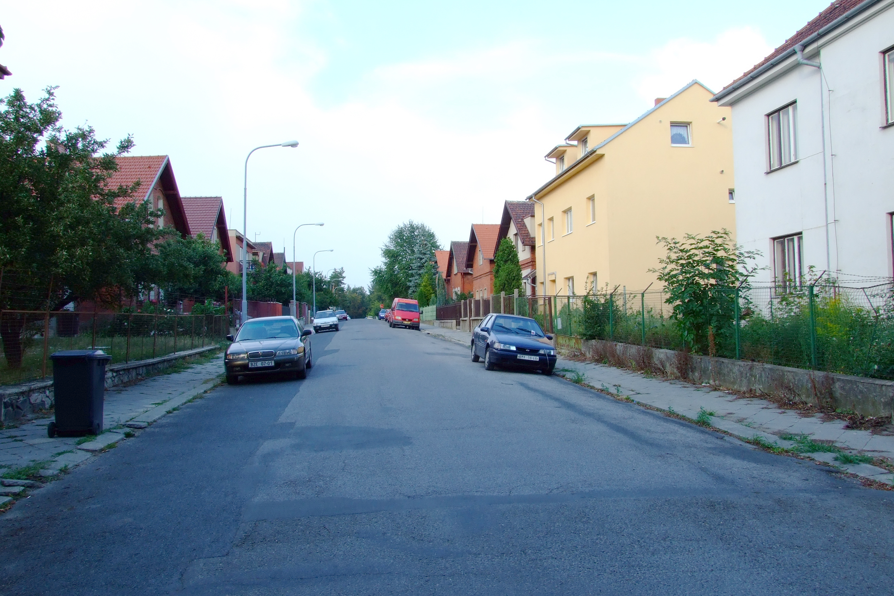 Brno-Černá Pole - domy v Muchově ulici